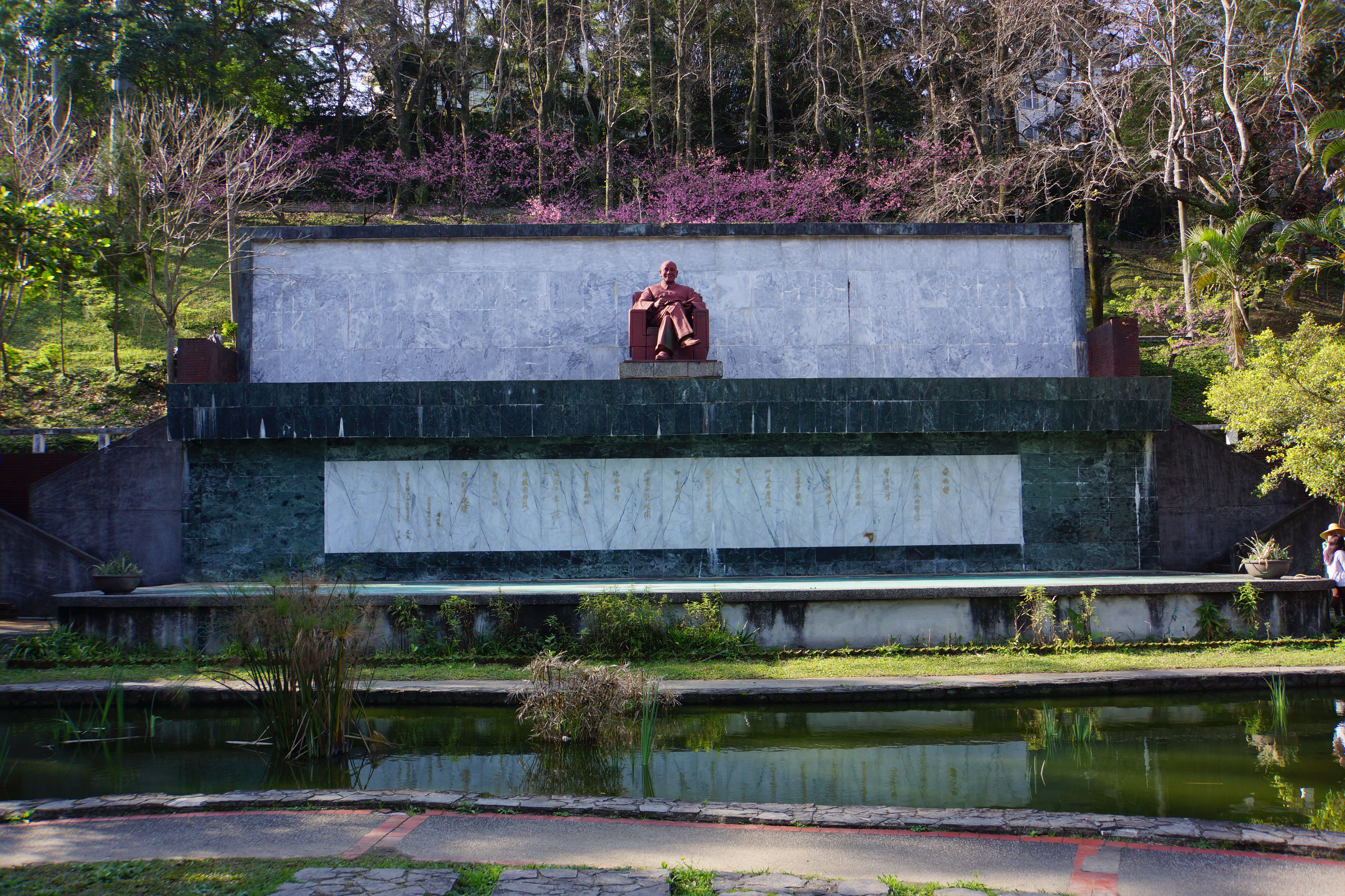 花園新城 Garden Town